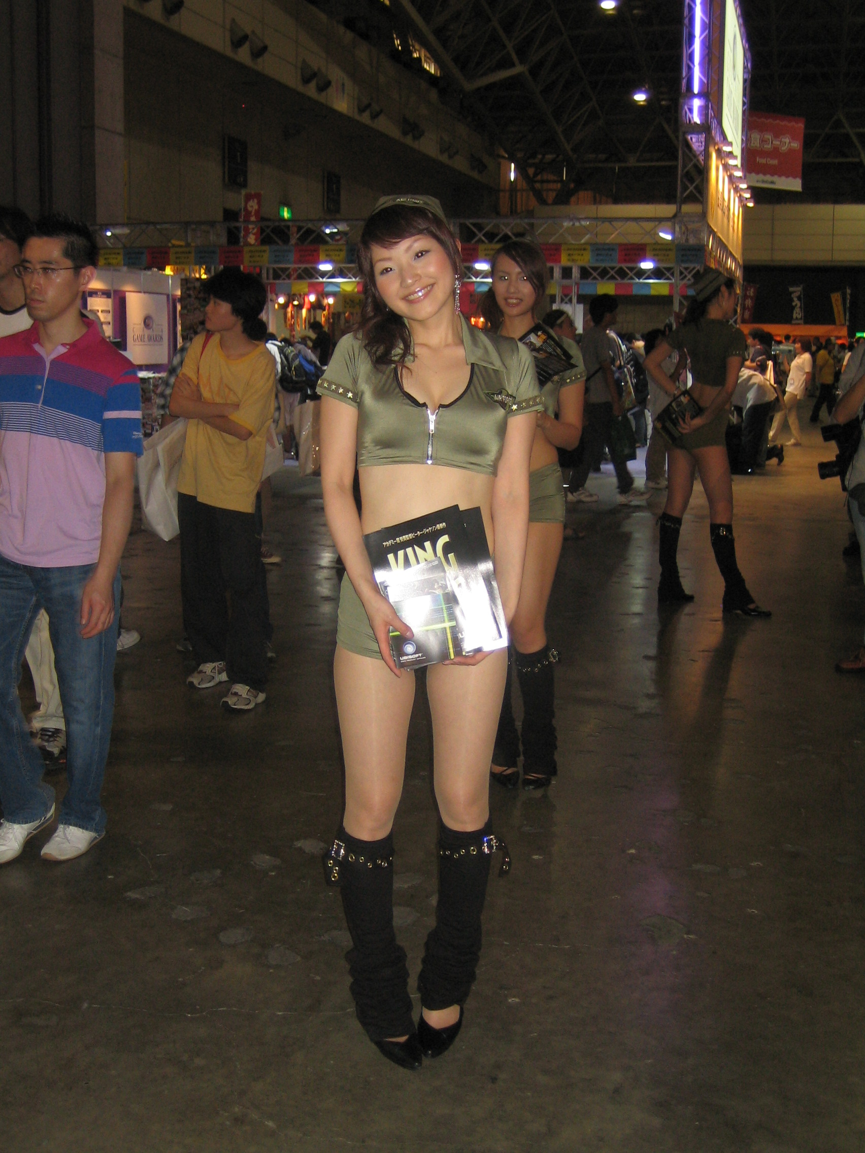 cho kawaii...